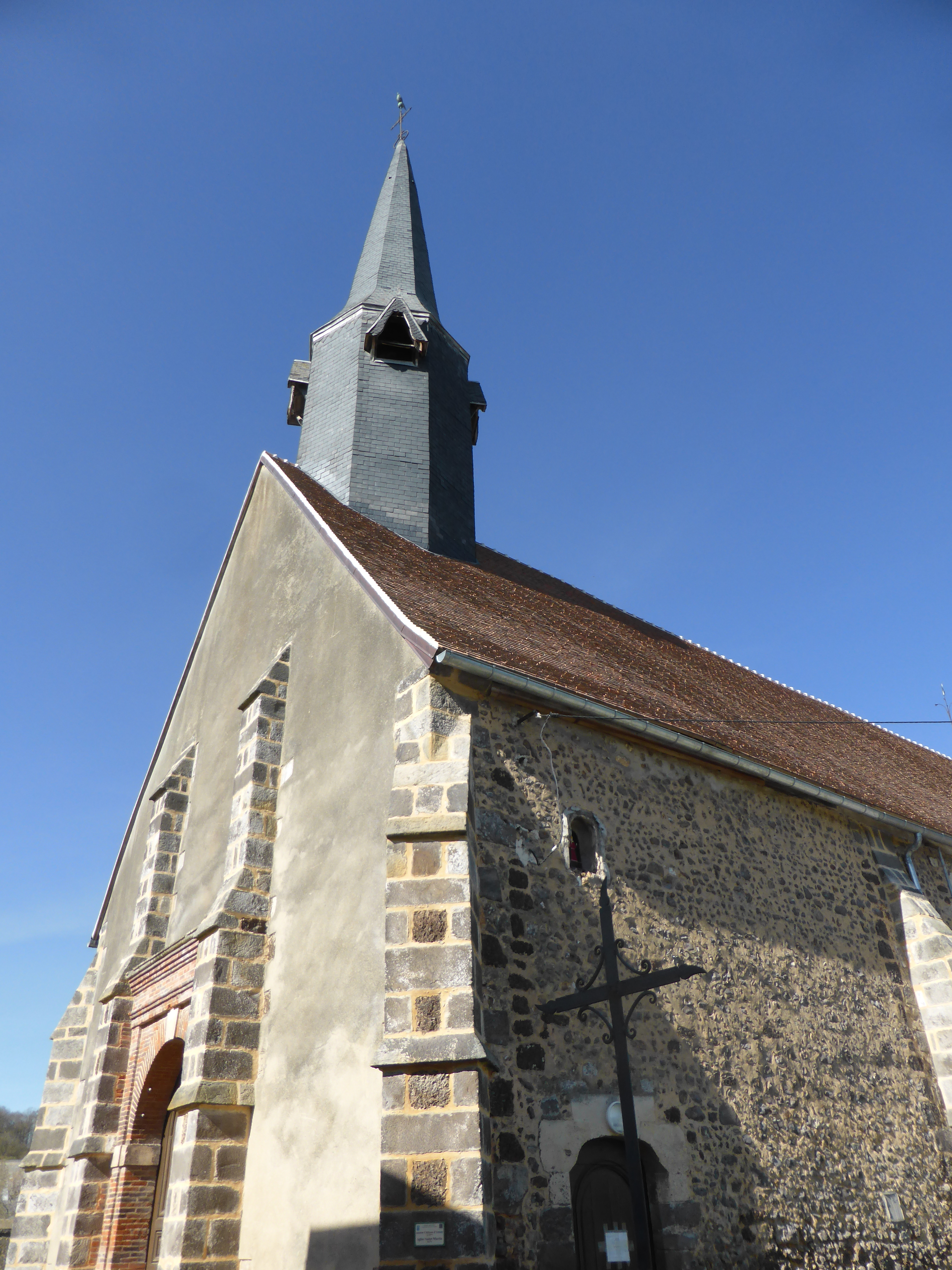 Église Saint-Martin d'Aunay-sous-Crécy, en Eure-et-Loir.